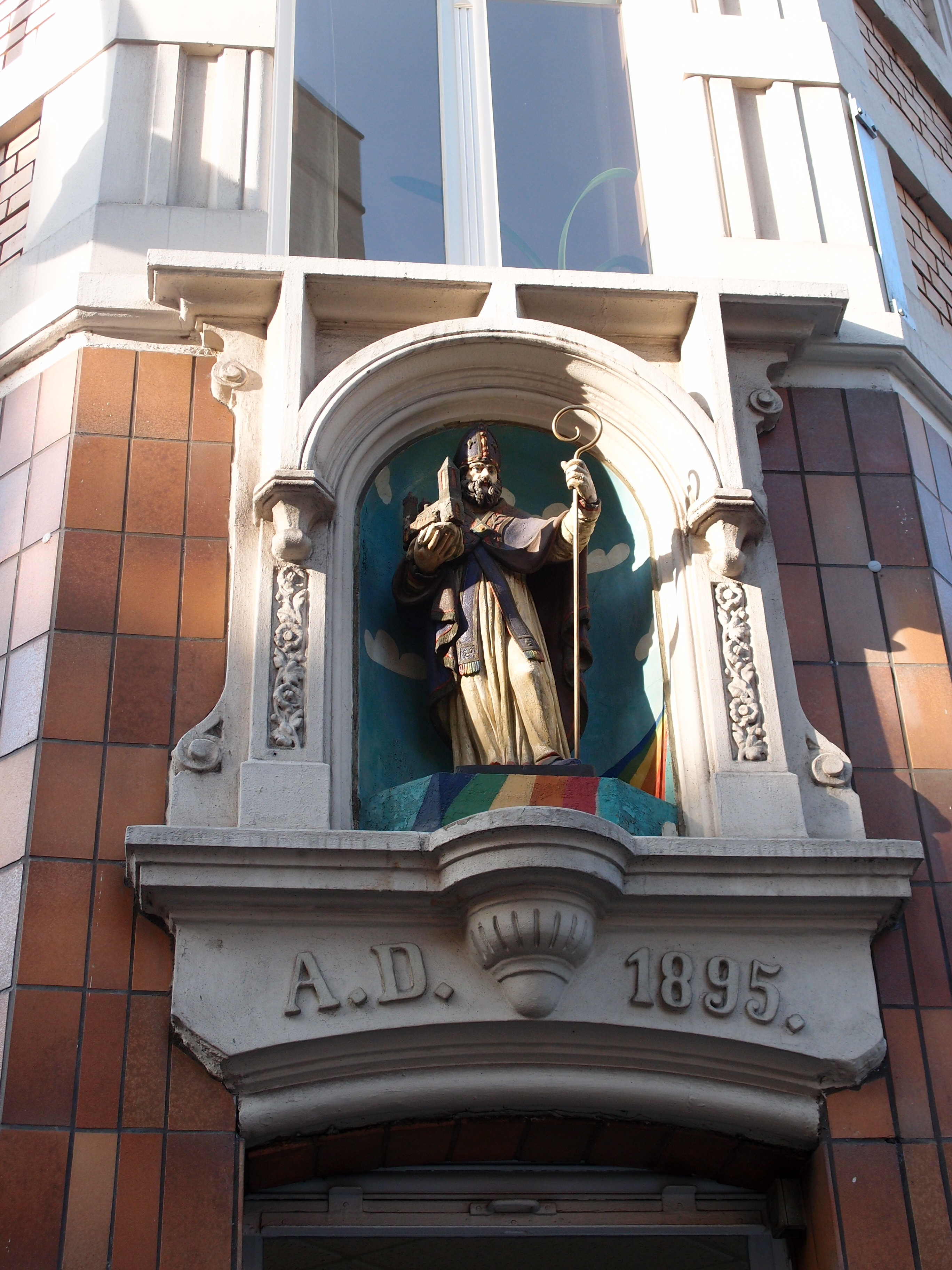 Statue im Kölner Severinsviertel (Severinstraße 1, Altstadt-Süd - neben der Severinstorburg) Datum: 19.11.2011 Urheber: M. Pfeiffer alias Gordito1869 Quelle: Privates Fotoarchiv des Urheber